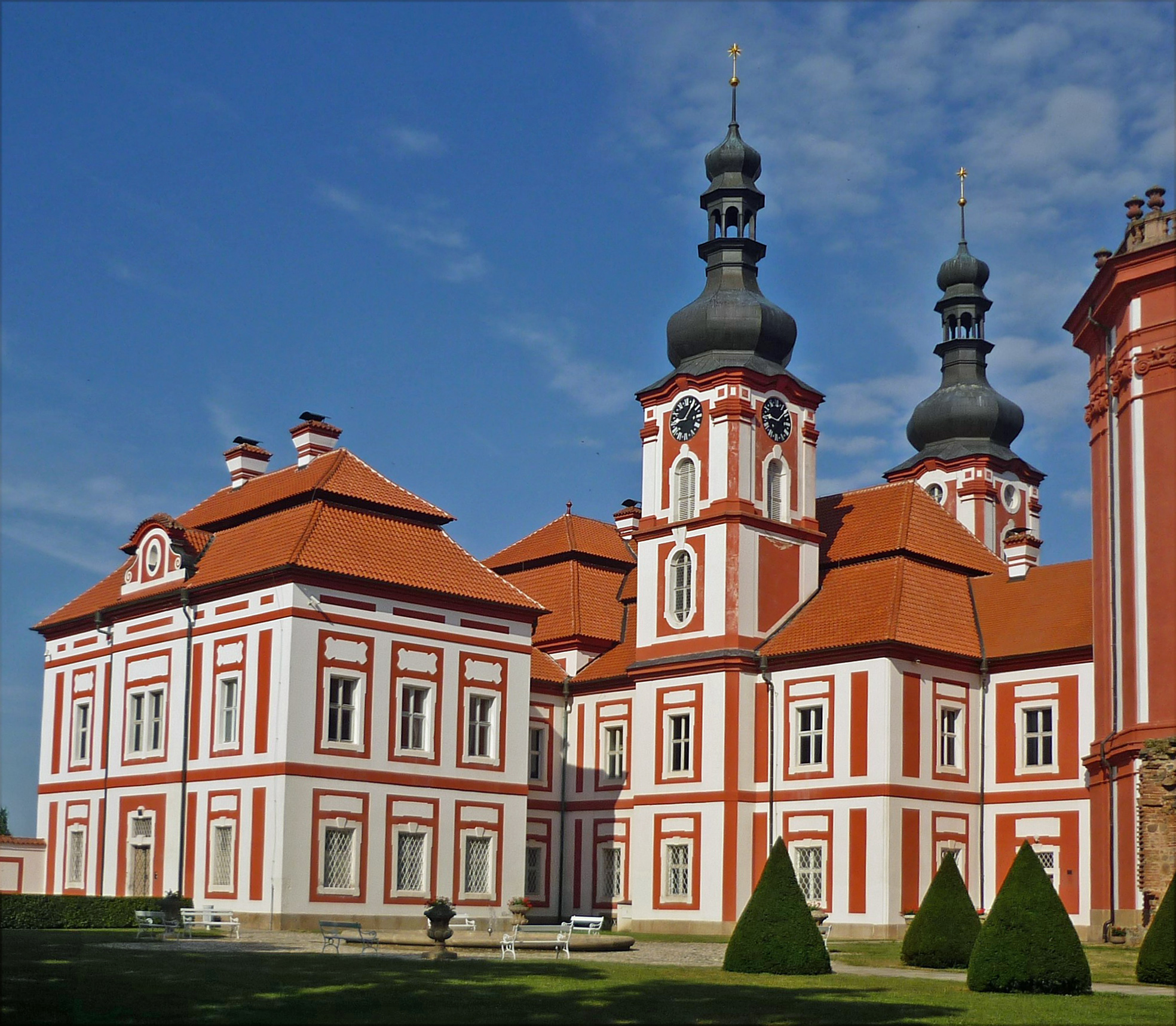 Propstei und Wallfahrtskirche Maria Teinitz (Mariánská Týnice) bei Kralovice